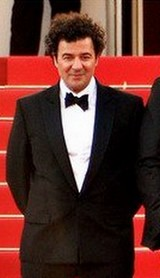 Le compositeur Ludovic Bource lors de la présentation de "The Artist" au festival de Cannes